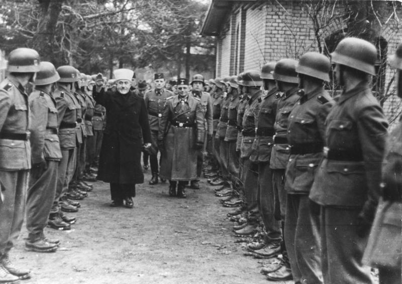 Der Großmufti von Jerusalem bei den bosnischen Freiwilligen-Verbänden der Waffen-SS. Der Grossmufti ist auf dem Truppenübungsplatz eingetroffen und schreitet die Front der angetretenen Freiwilligen mit erhobenem Arm ab. SS-PK.-Mielke Nov.1943